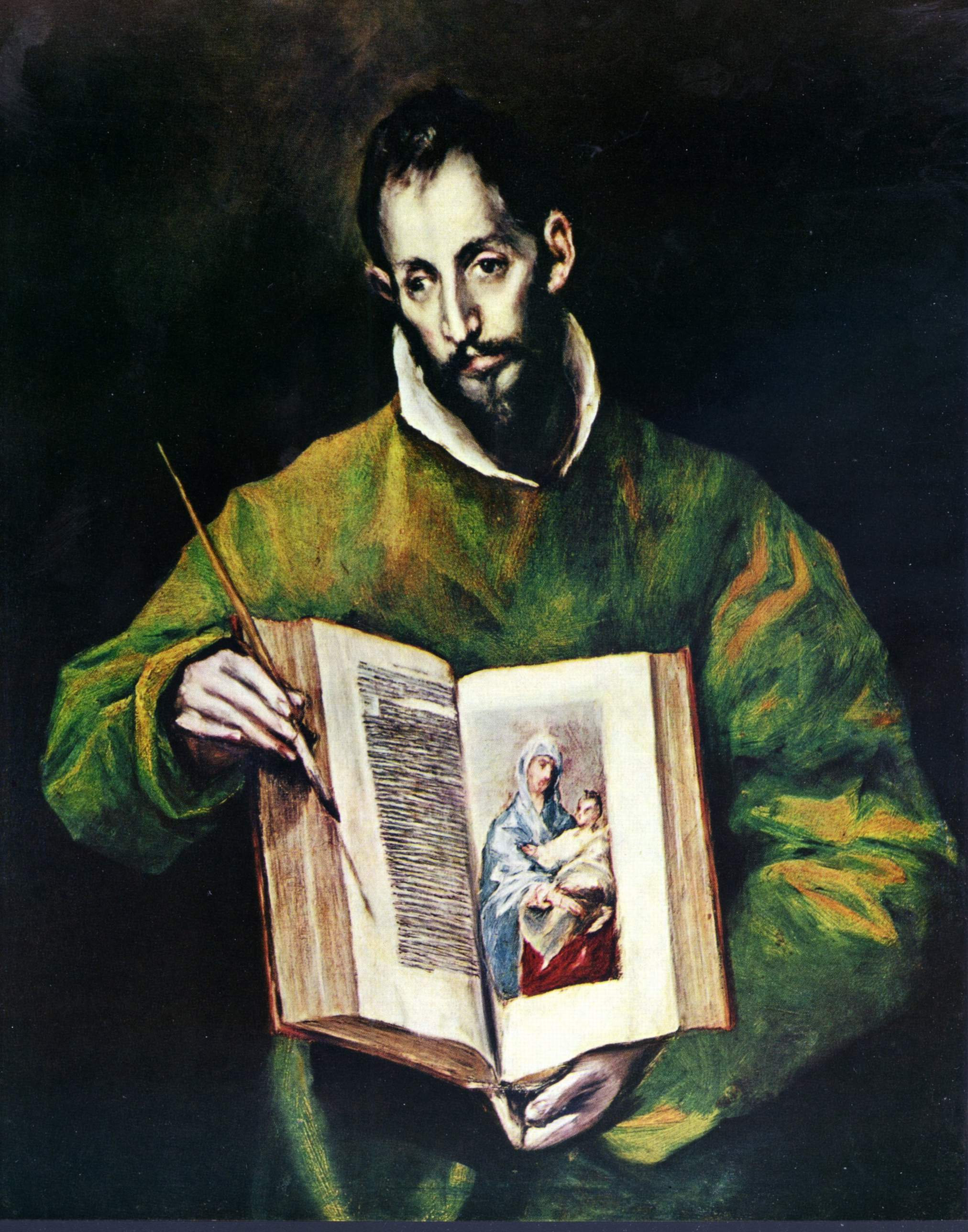 El lienzo representa a San Lucas Evangelista, autor del Evangelio de San Lucas.